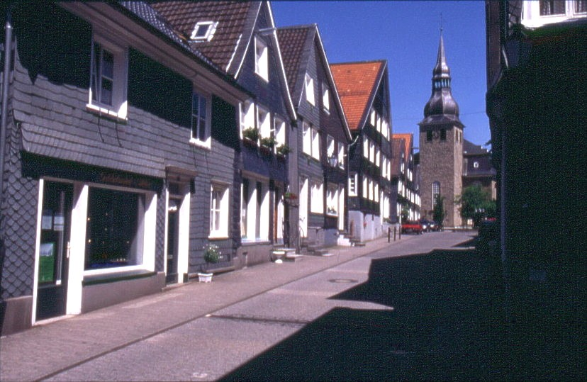 Marktstraße in Hückeswagen GFDL von der Stadt Hückeswagen zur Verfügung gestellt am 27.09.2004